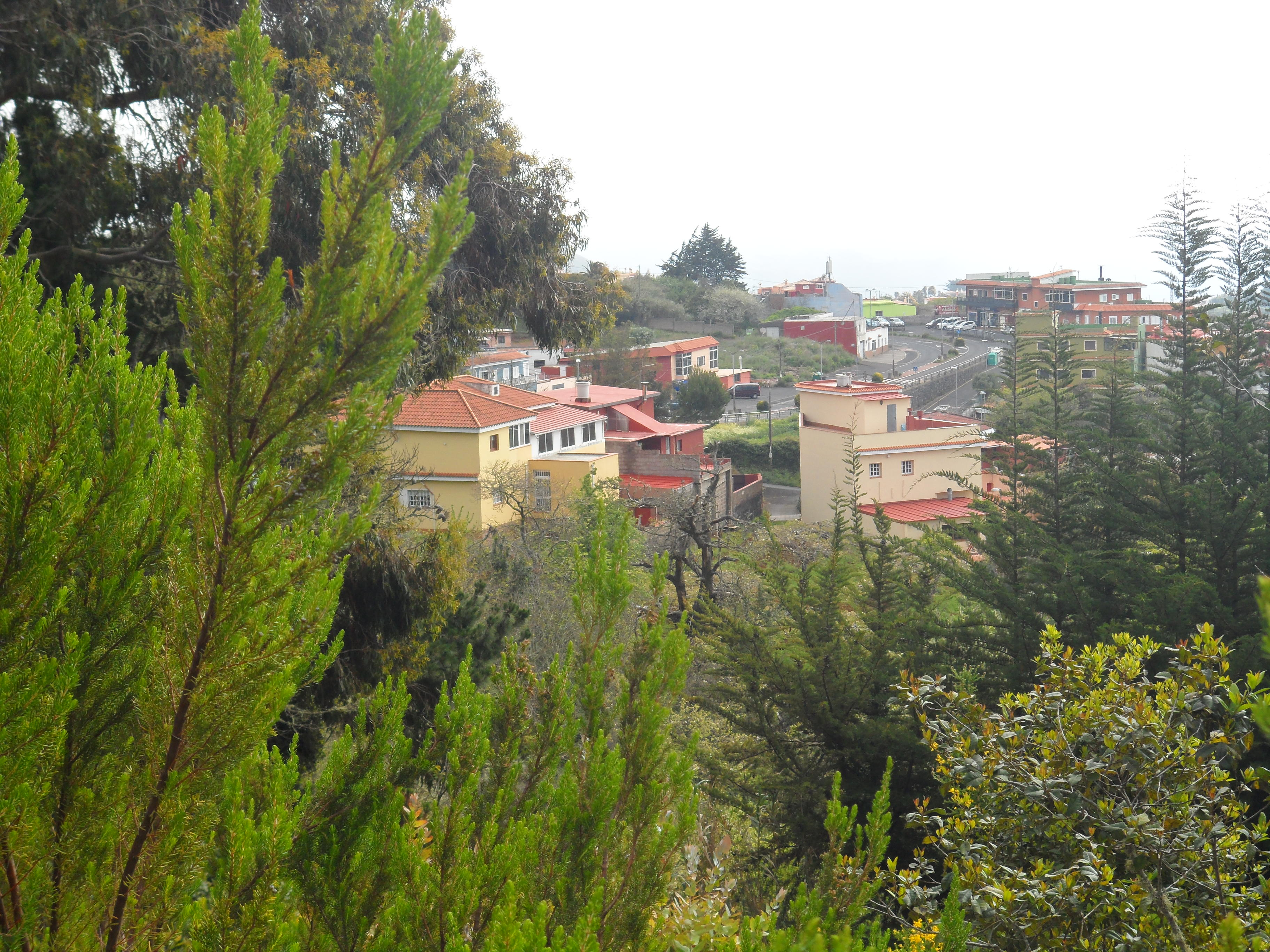 Panorámica de Las Rosas desde lo alto del sendero.